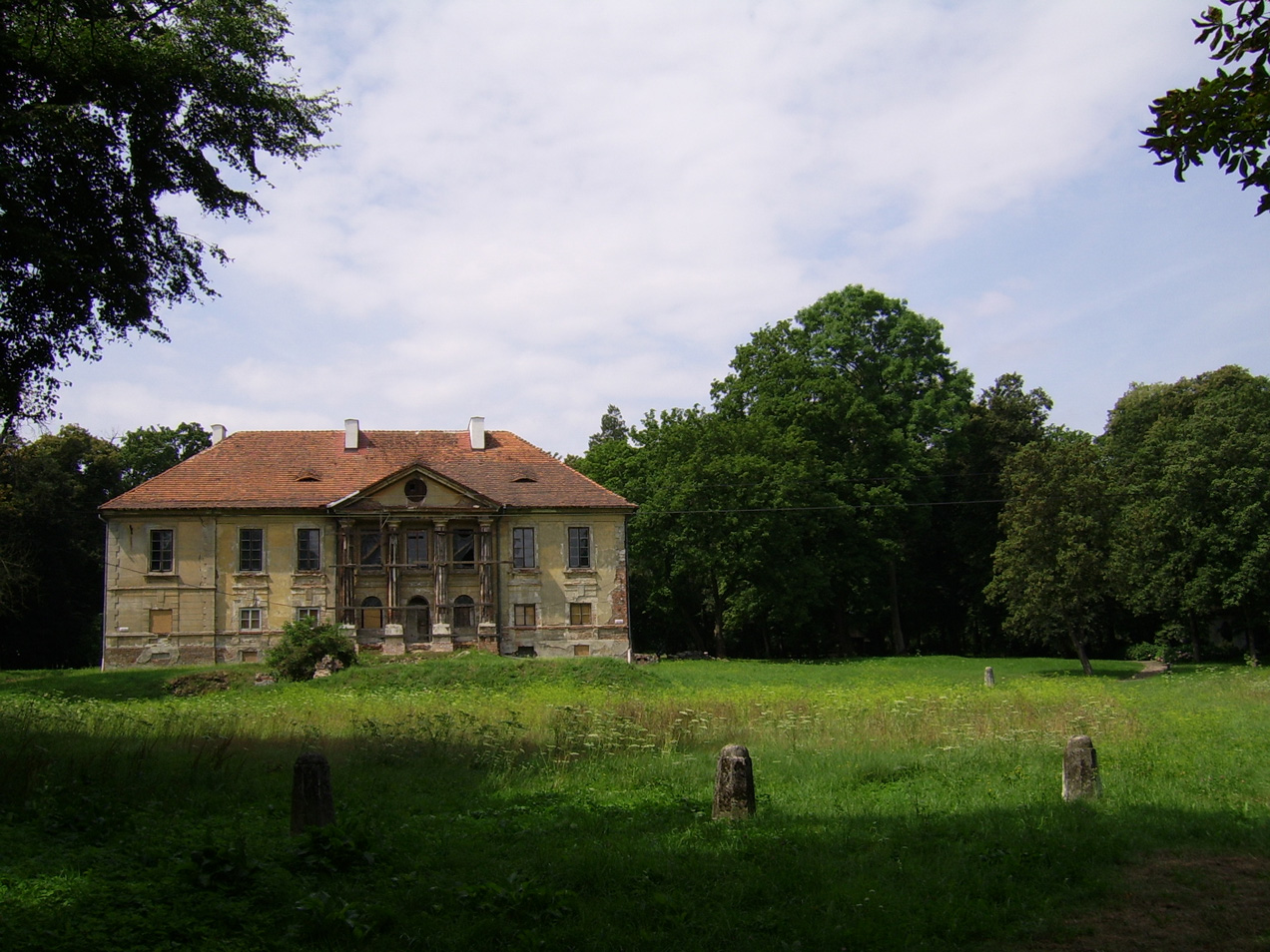 Pławowice - Pałac, po prawej stronie kaplica.